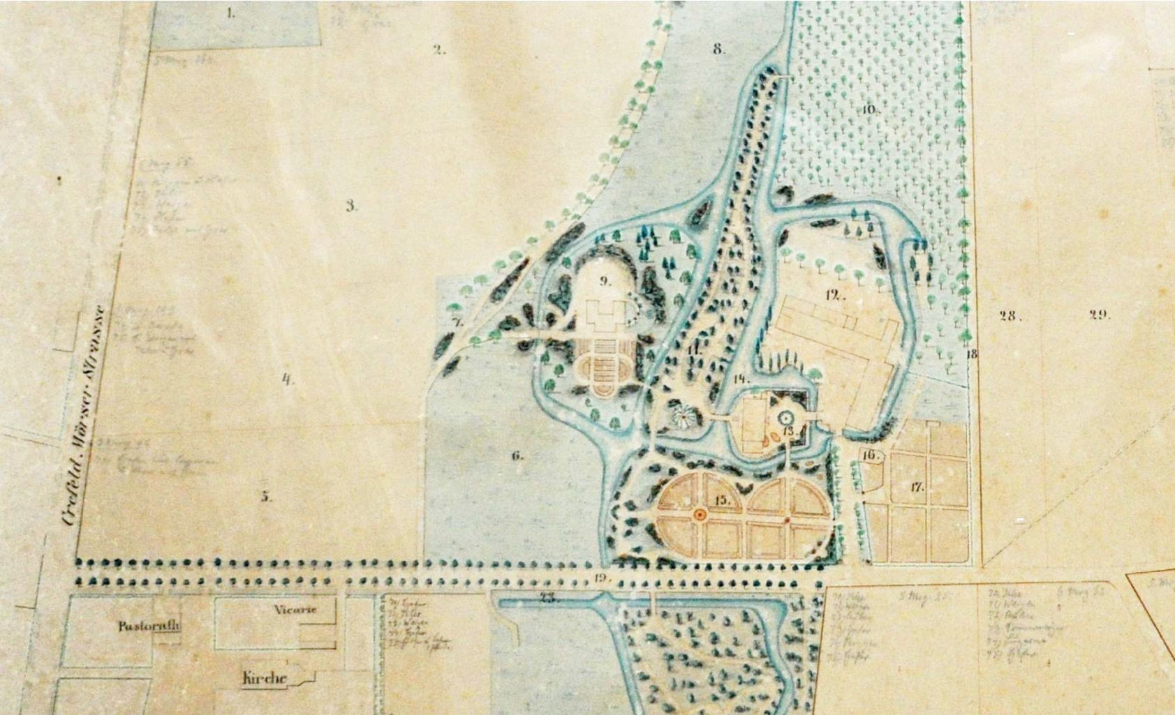 Der Plan zeigt die Anlage "Haus Traar" in Krefeld, Nordrhein-Westfalen, Deutschland. Orginal Plansignatur: "Aufgenommen und gezeichnet Kempen im Mai 1873 Der Geometer Kinkel"